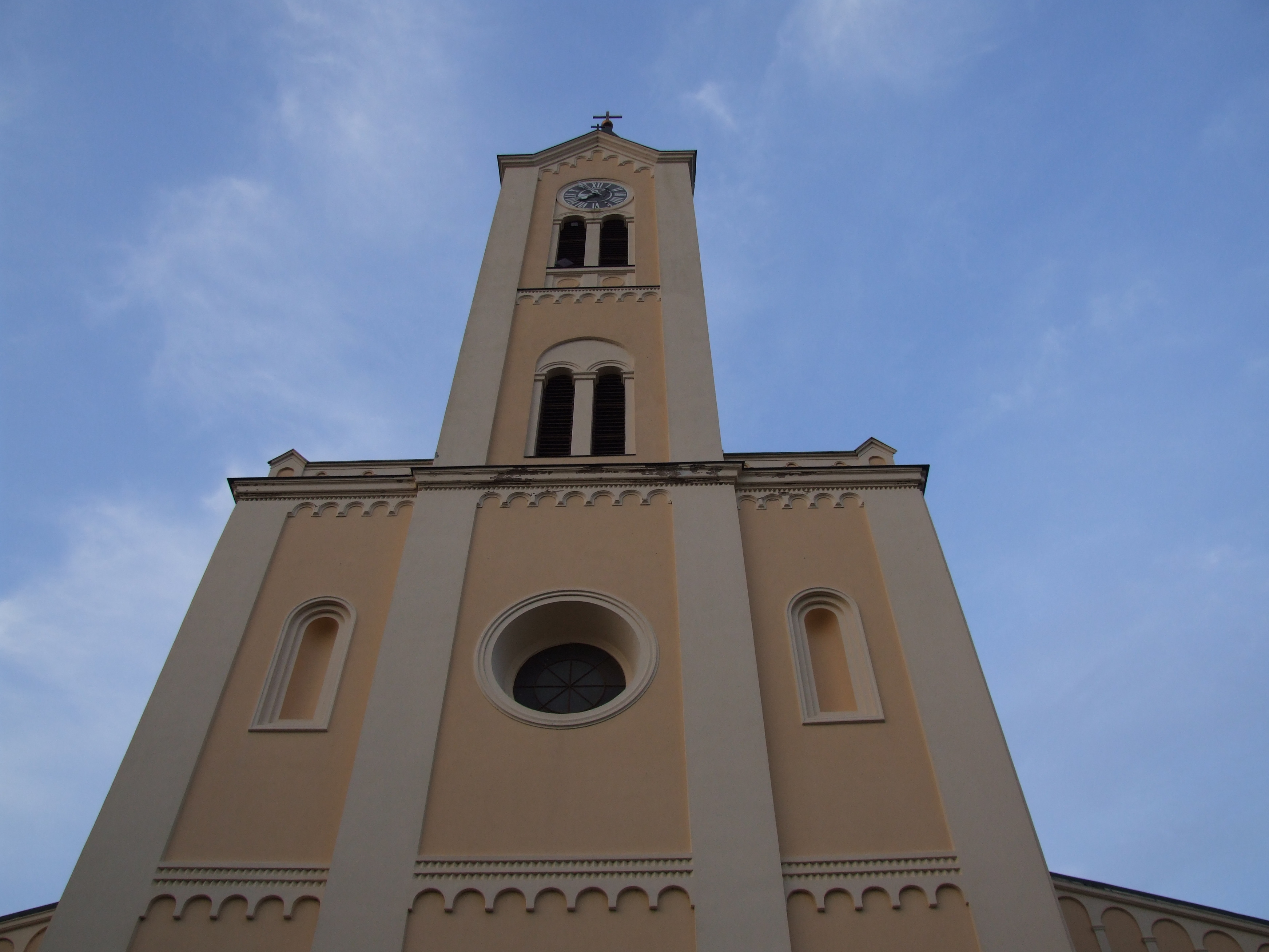 A Jézus szíve templom, Paks This is a photo of a monument in Hungary, Identifier: -2961 This is a photo of a monument in Hungary, Identifier: -2878